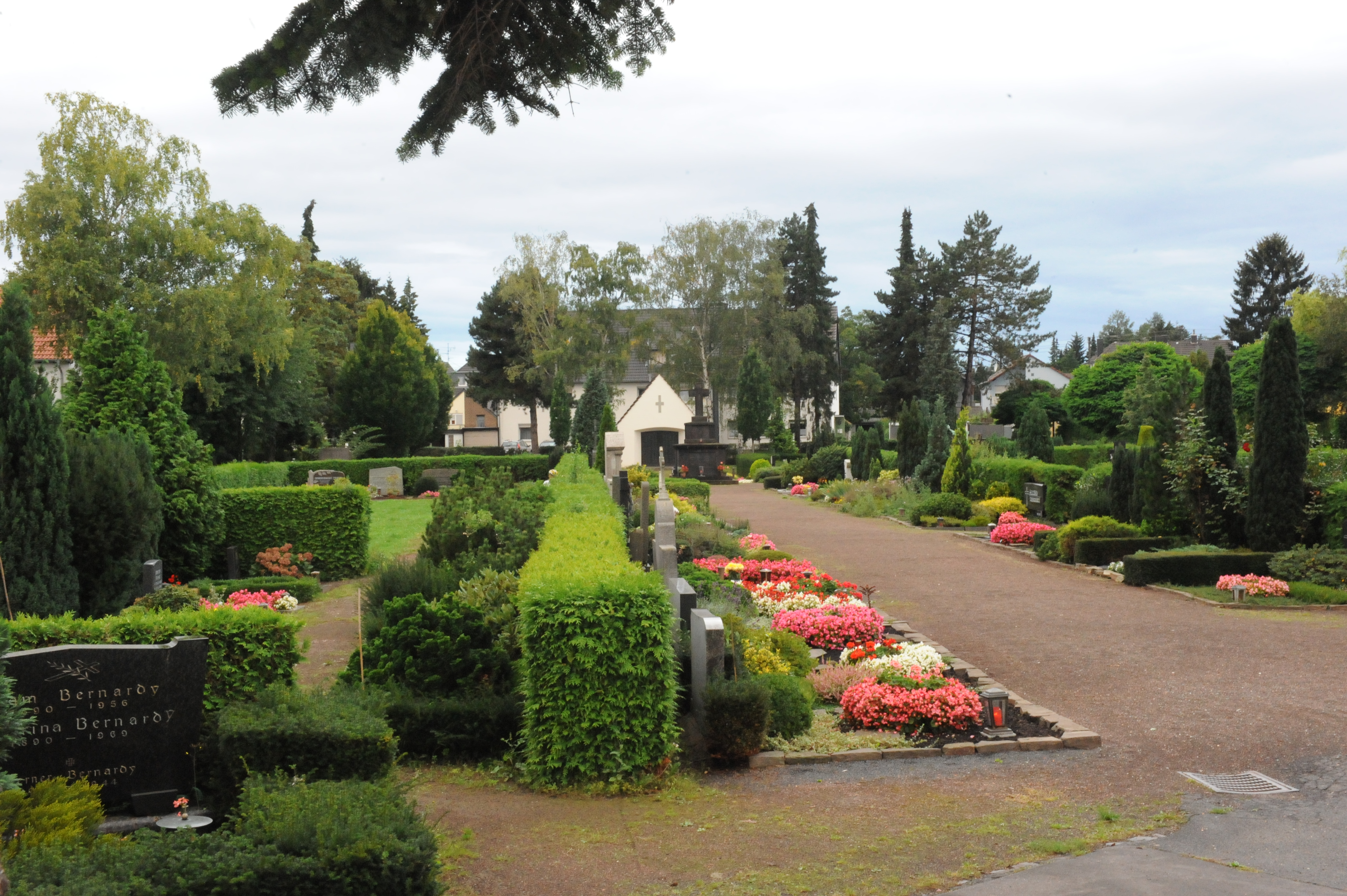 Baudenkmal Friedhof Meschenich, Trenkebergstraße, mit Kriesehrenmal und Trauerkapelle